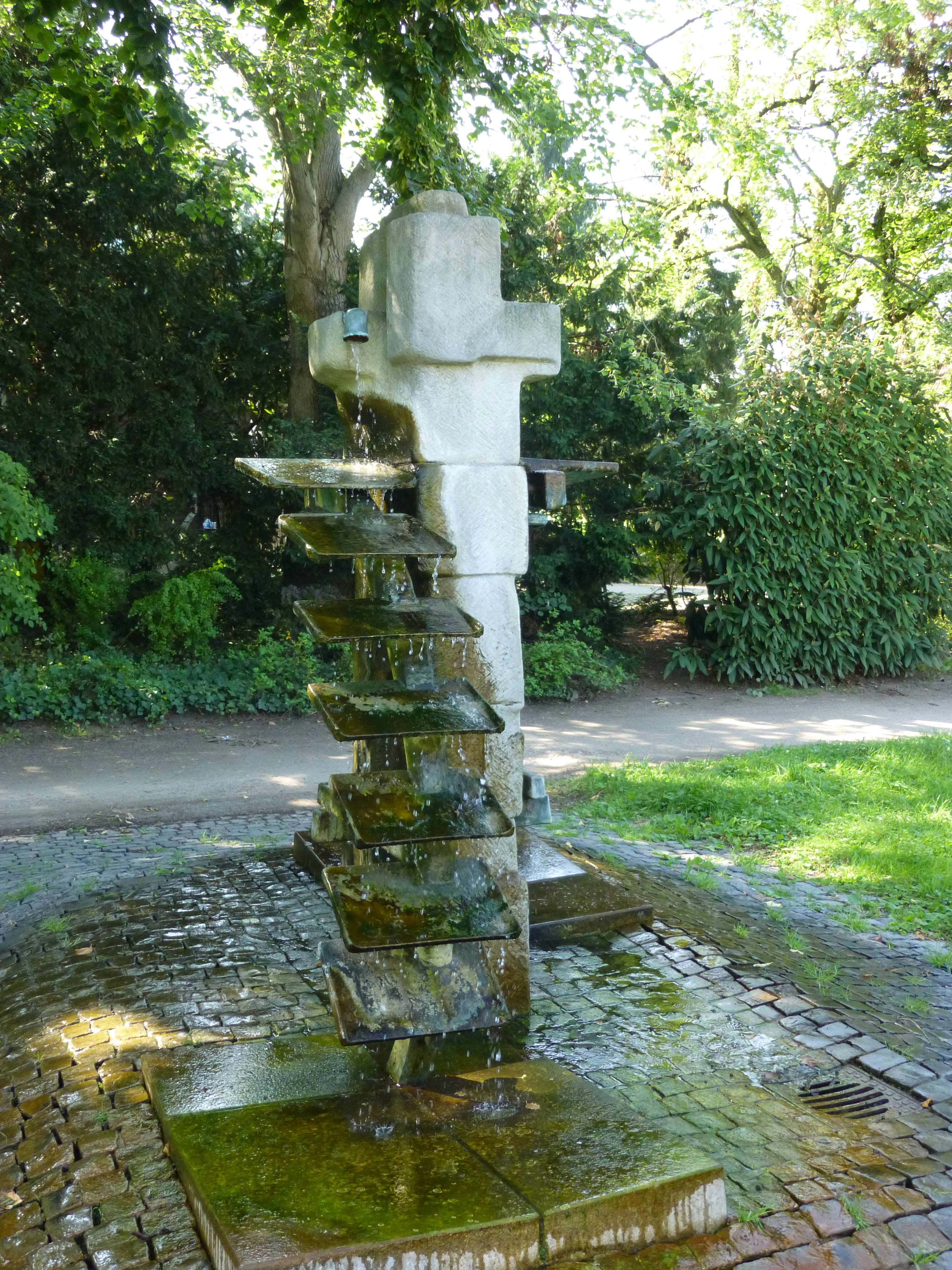 Mühlendenkmal 2